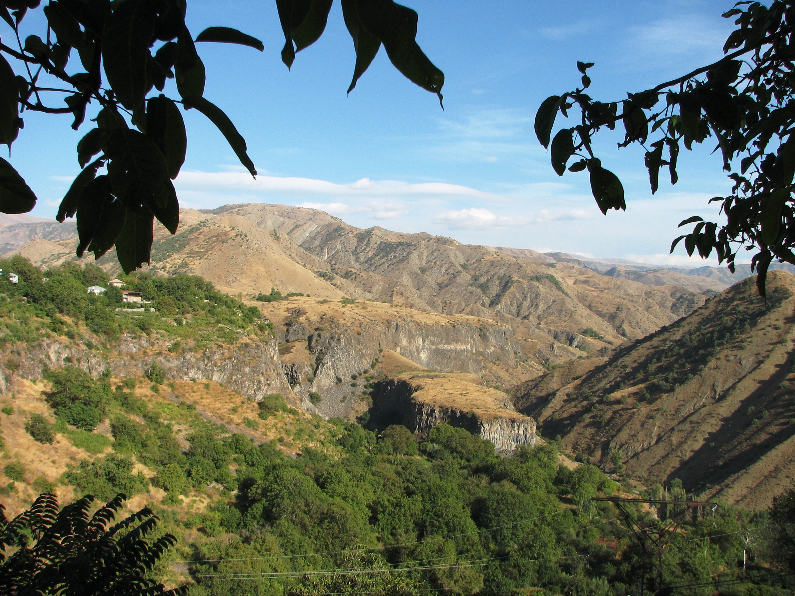 Garni Gorge is situated 23 km east of Yerevan, Armenia קניון גרני נמצא מזרחית לירוואן בירת ארמניה. התופעה המייחדת את הקניון הם עמודי בזלת בצורת משושים מבט על הקניון ממקדש גרני